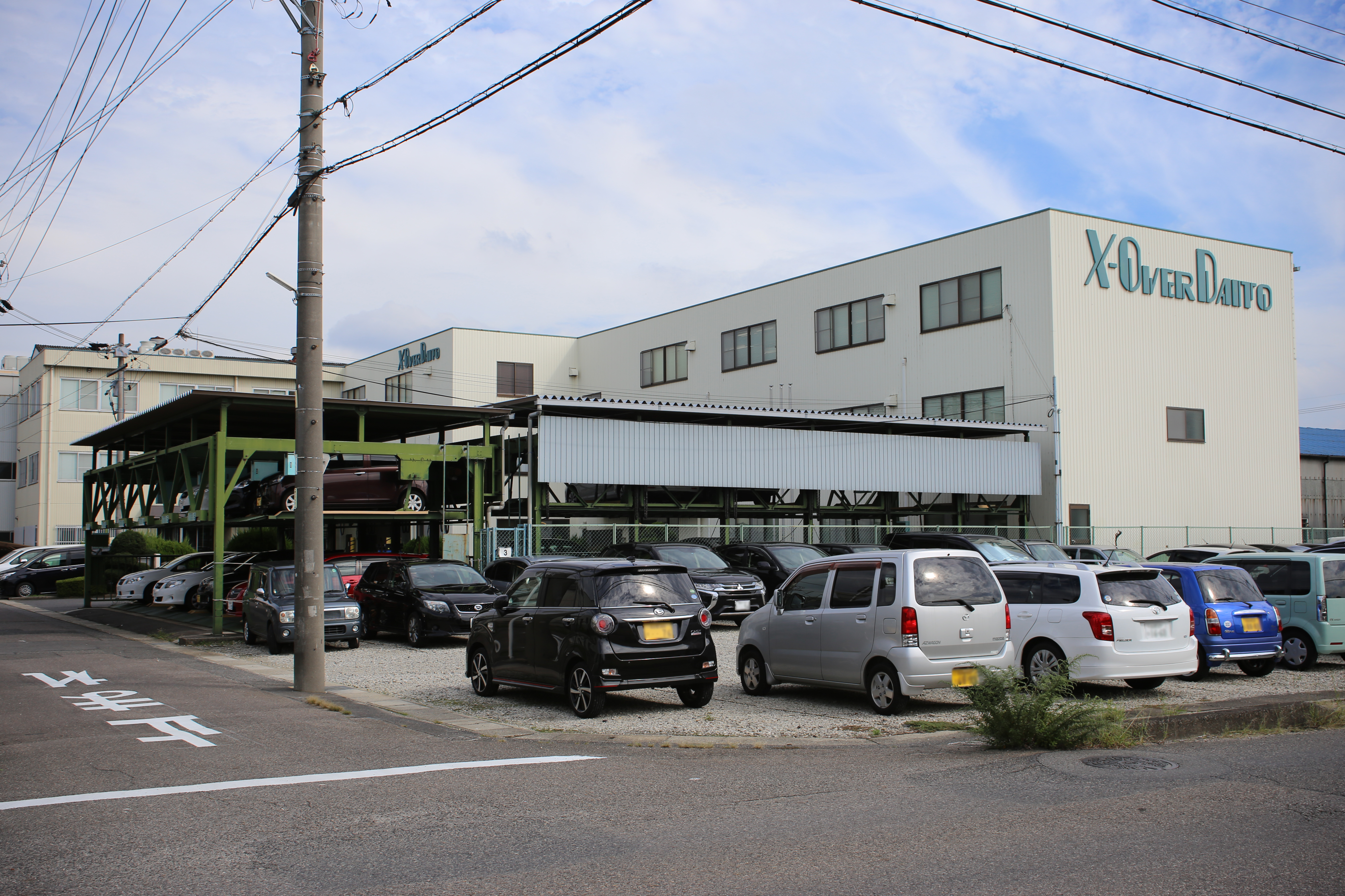 愛知県春日井市御幸町のダイトーエムイー本社を西側公道北側より撮影。ただし、ナンバープレートにつき画像処理済。